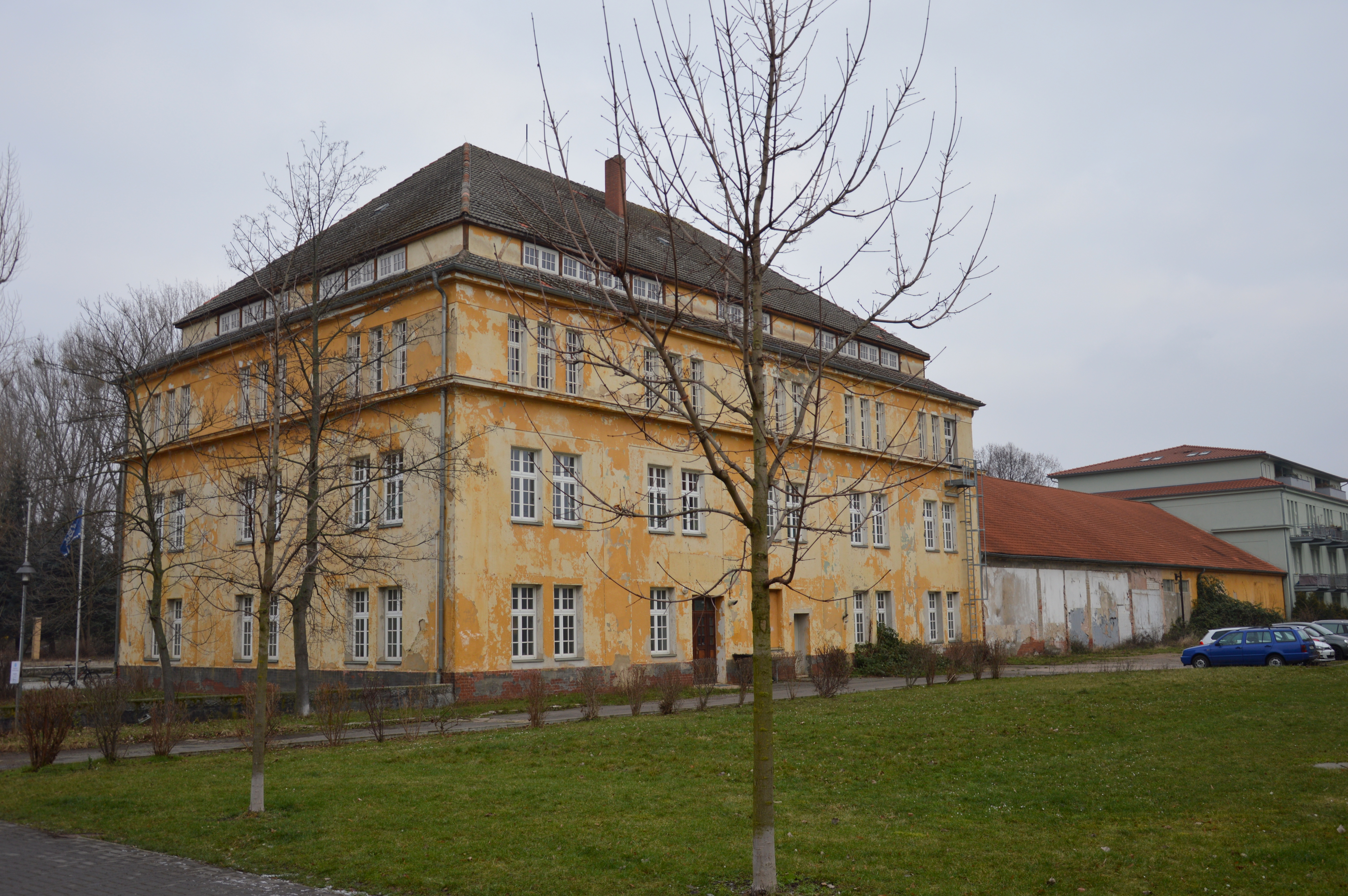 Encke-Kaserne Gebäude in Magdeburg